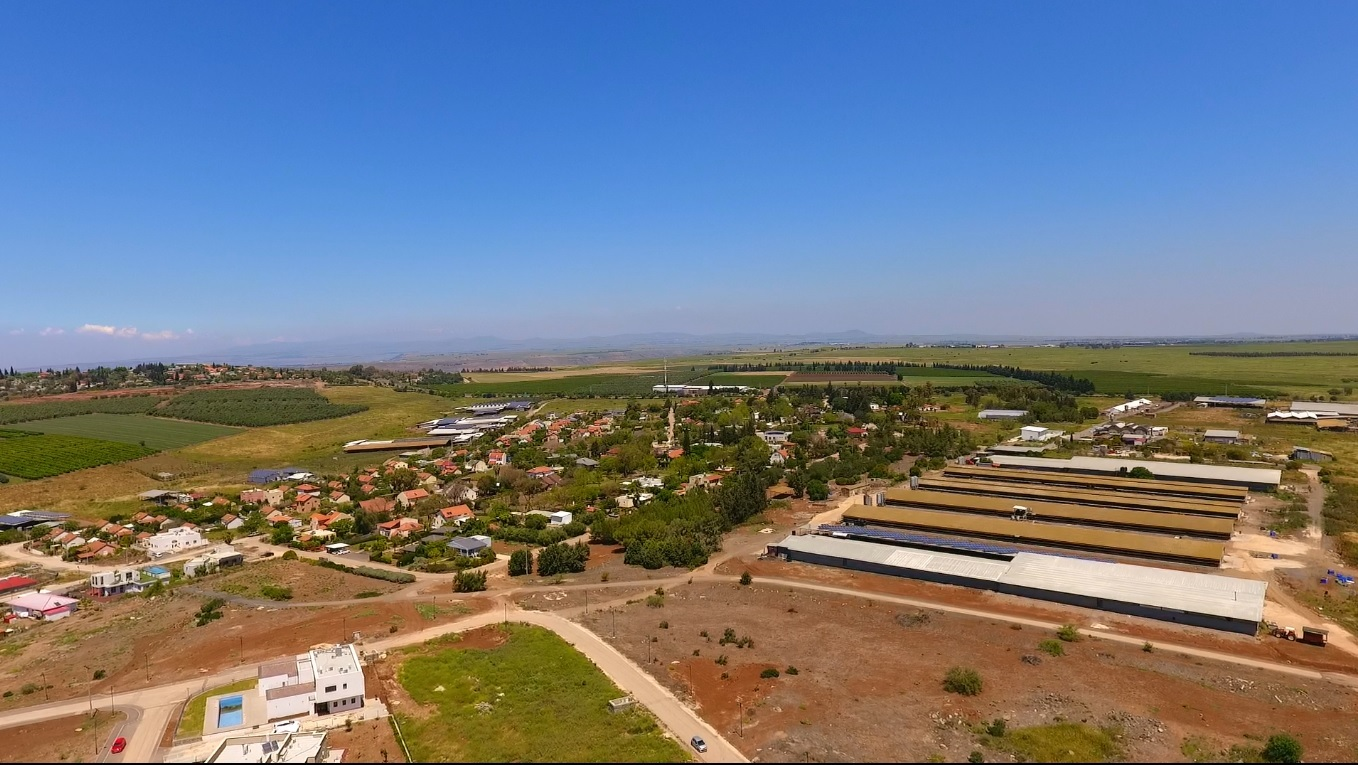 צילום